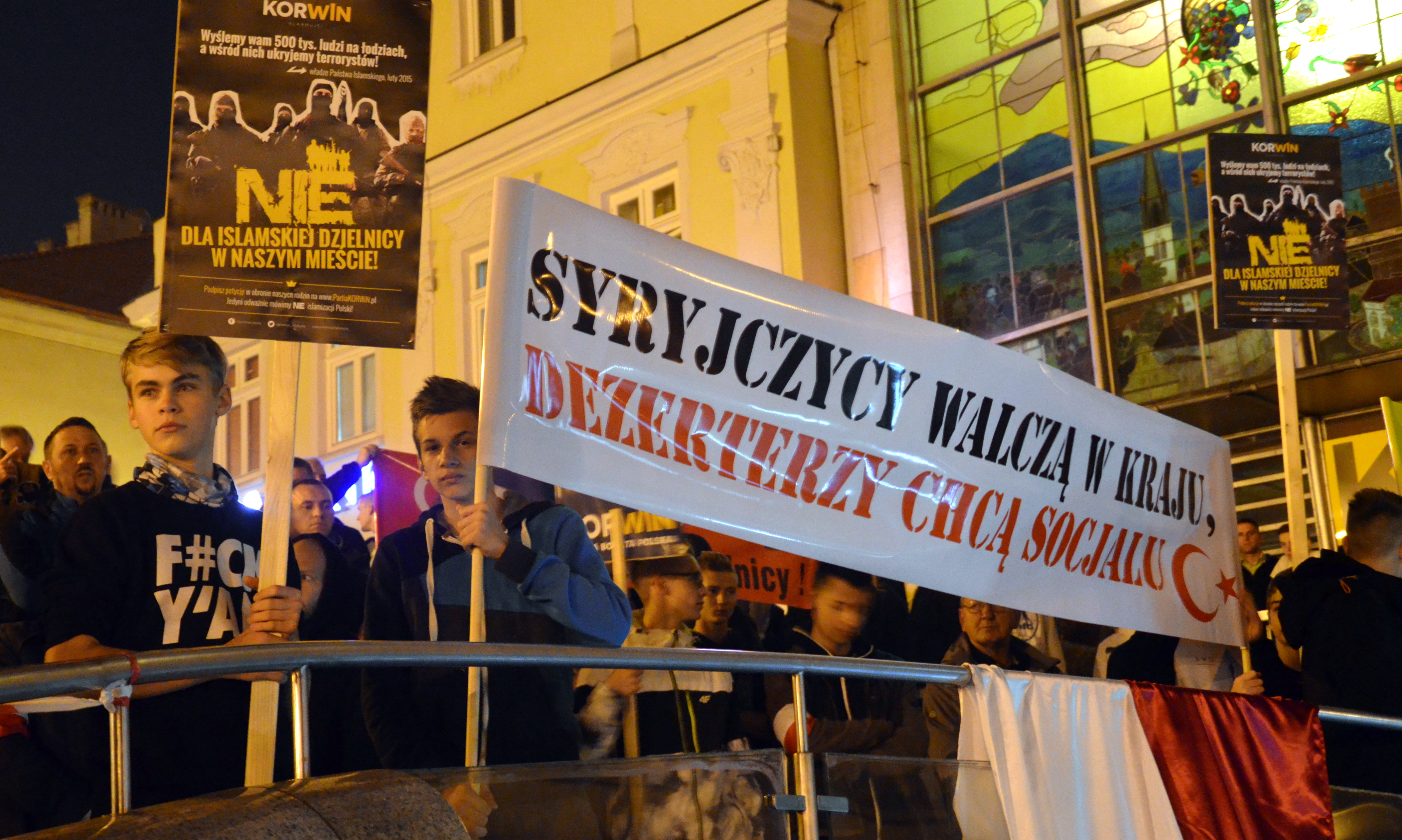 Der anti-islamische Protest in Polen